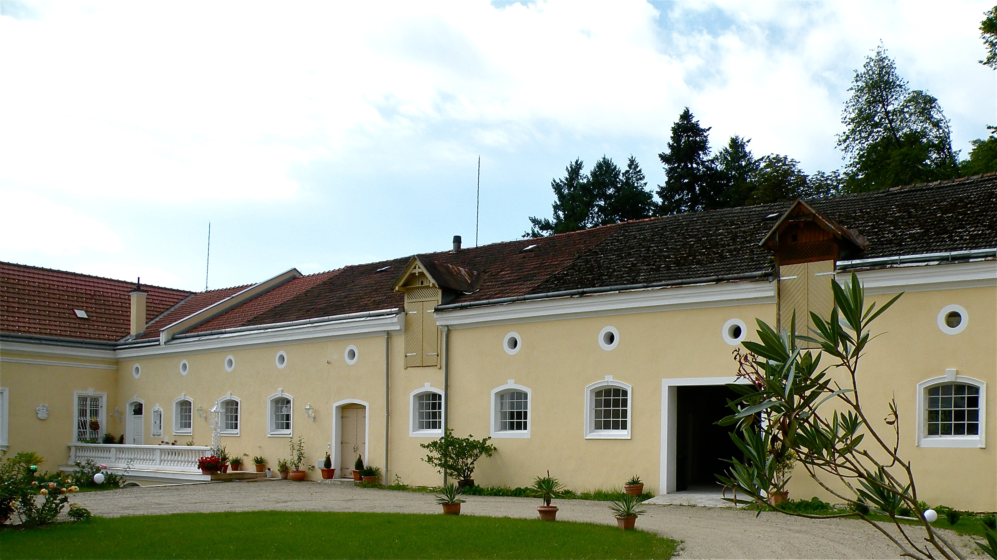 Wirtschaftsgebäude von Schloss Dornach in der Marktgemeinde Saxen im Bezirk Perg in Oberösterreich